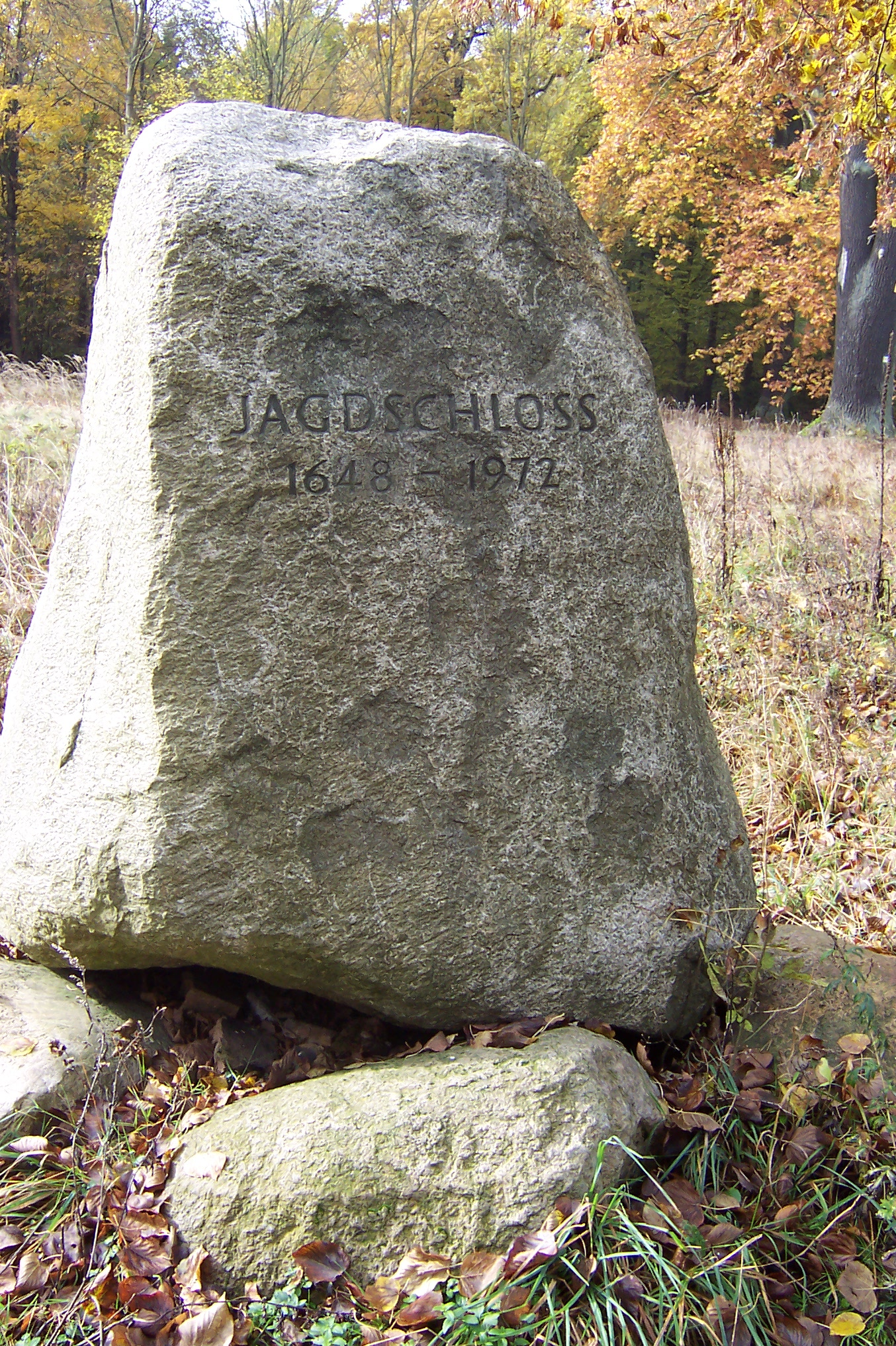 Der 1995 aufgestellte Gedenkstein für das Jagdschloss Weißwasser